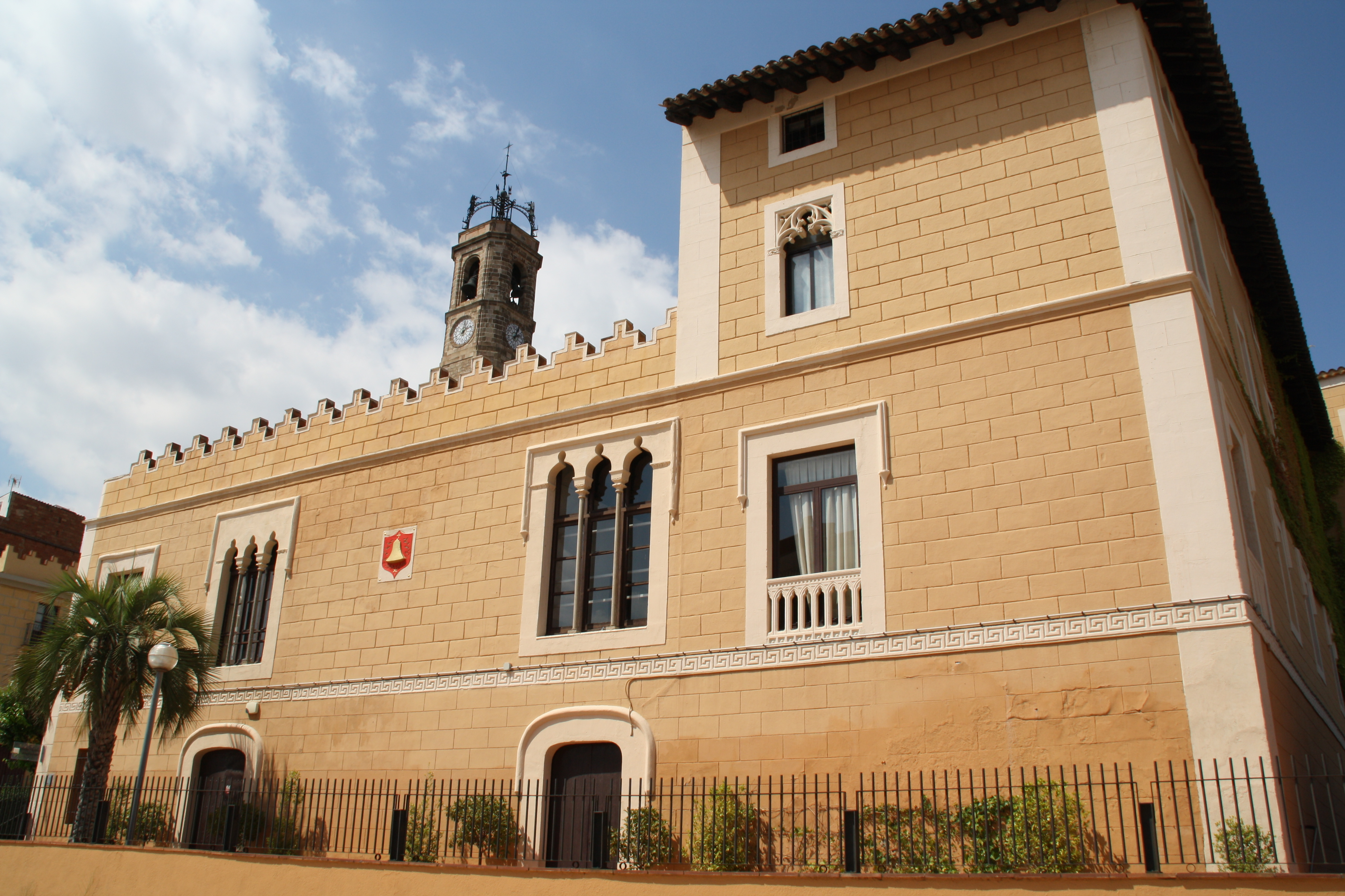 Façana principal de la Torre Vella a Badalona.